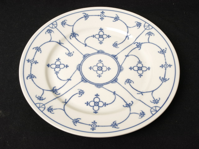 Deserteller mit Dekor Indisch Blau Marke Winterling Bavaria 40